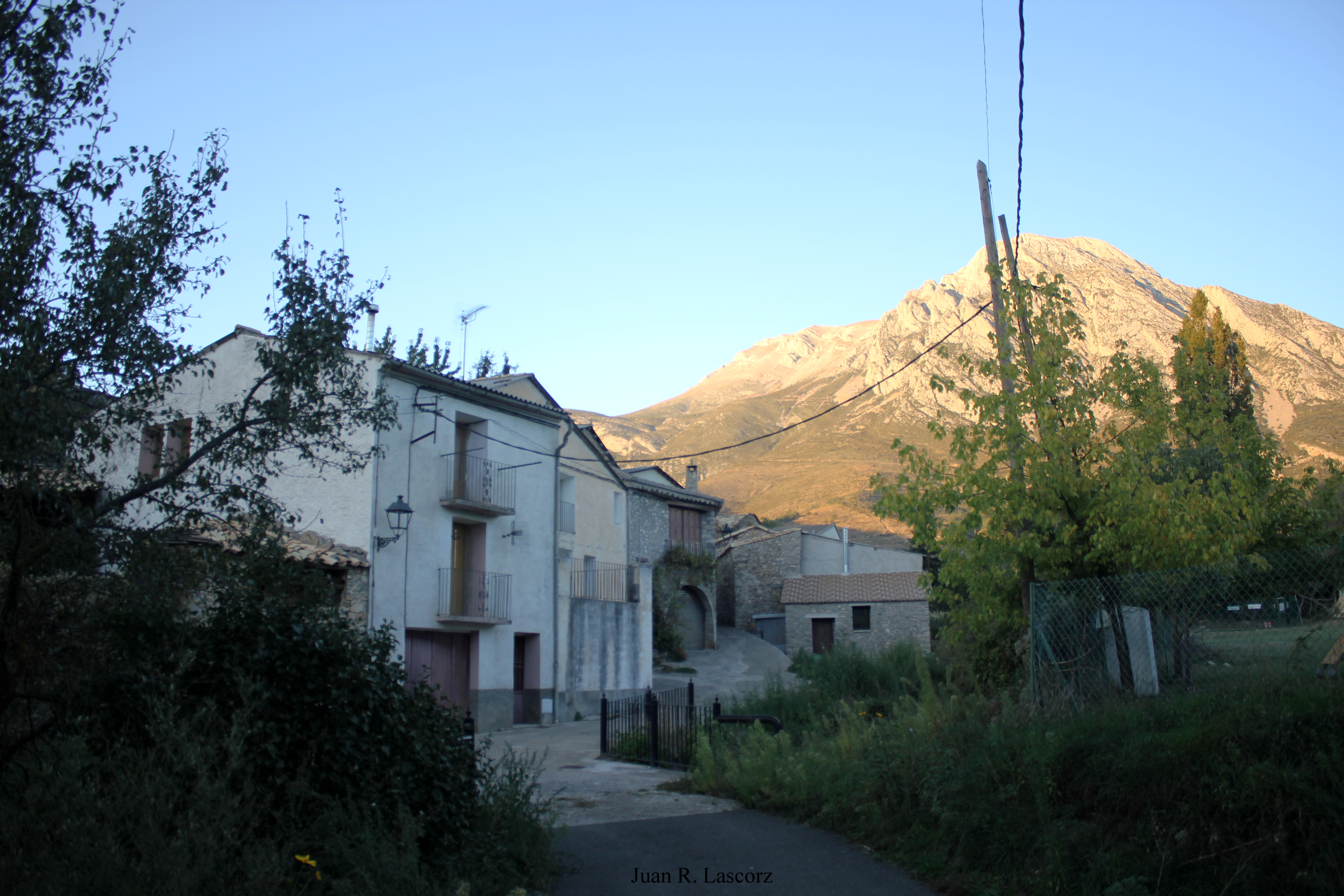 Aragonés: Carrera en Eixea, Vall de Lierp.